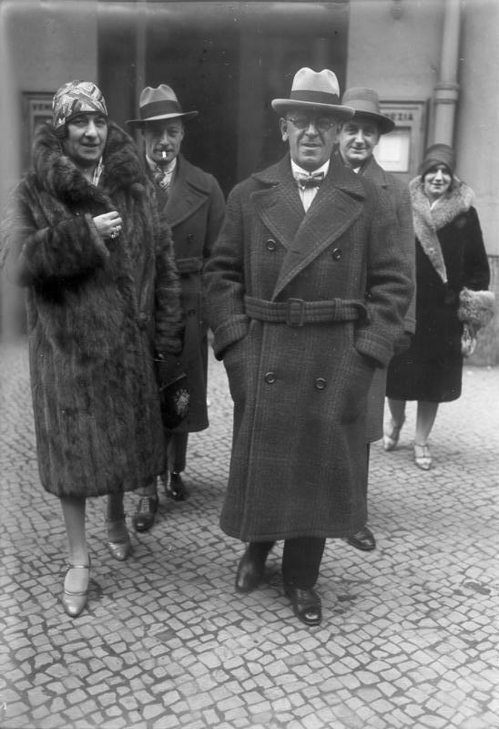 Dieser Mann hat sich ein Vermögen zusammengelacht! Grock, der König der Clowns mit seiner Gattin, welcher augenblicklich in Berlin zum letzten Male gastiert, wird sich nach diesem Gastspiel an der Riviera zur Ruhe setzen. Sein Vermögen beträgt mehrere Millionen Mark.